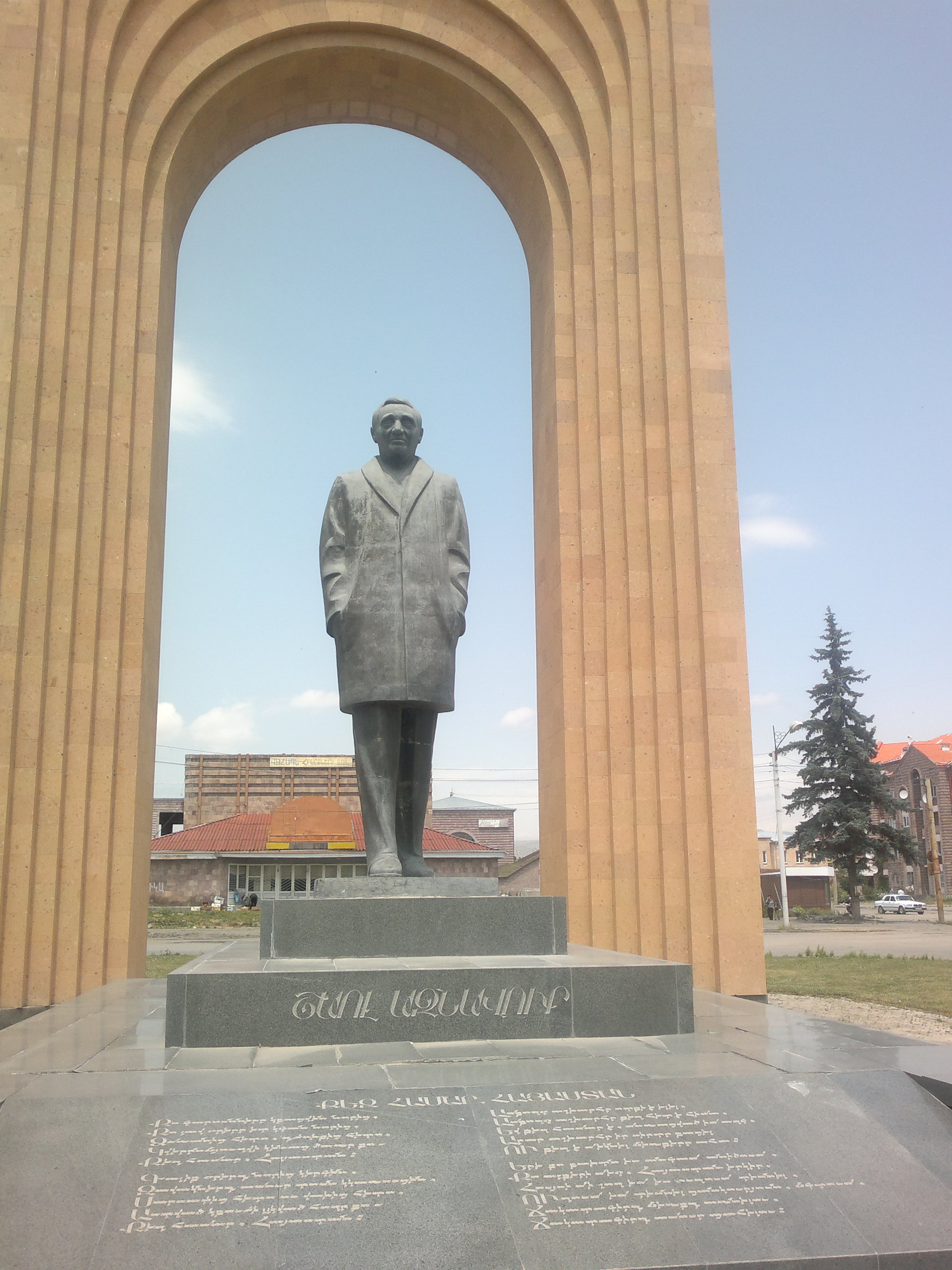 Շառլ Ազնավուրի հուշարձանը Գյումրիում 1/4.875